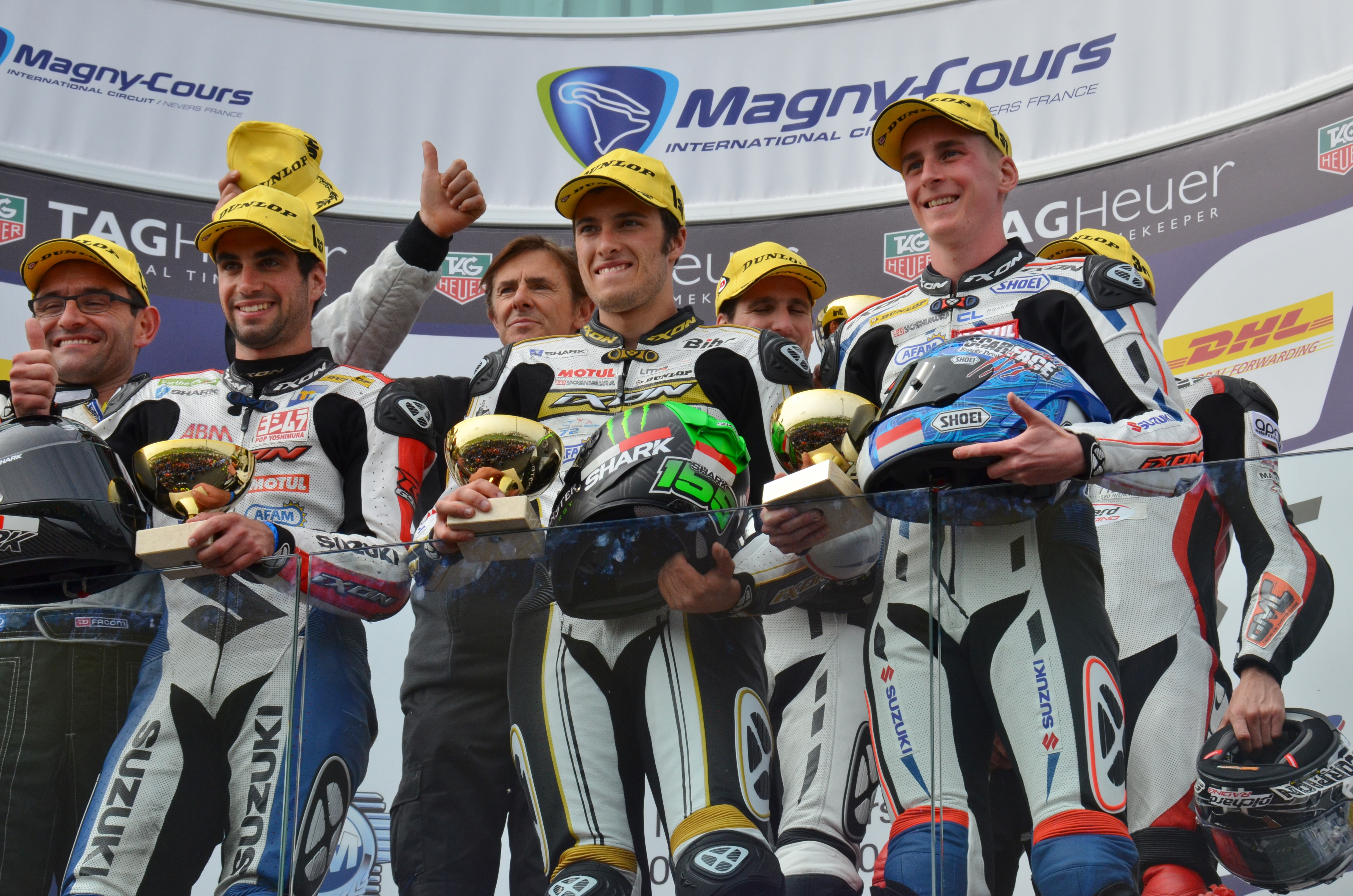 Etienne Masson lors du Bol d'Or 2013